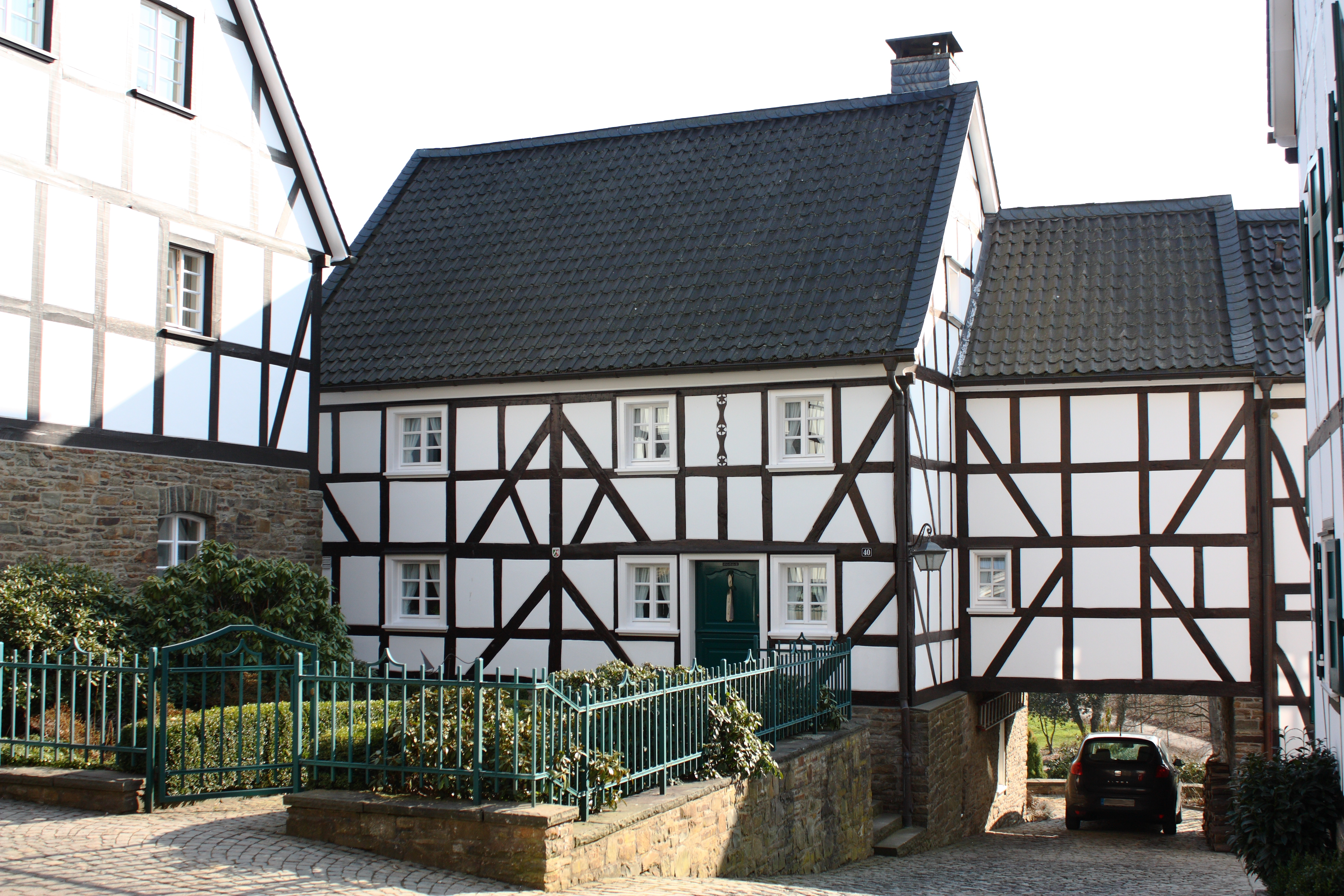 Eines der denkmalgeschützten Fachwerkhäuser der Wiehler Altstadt